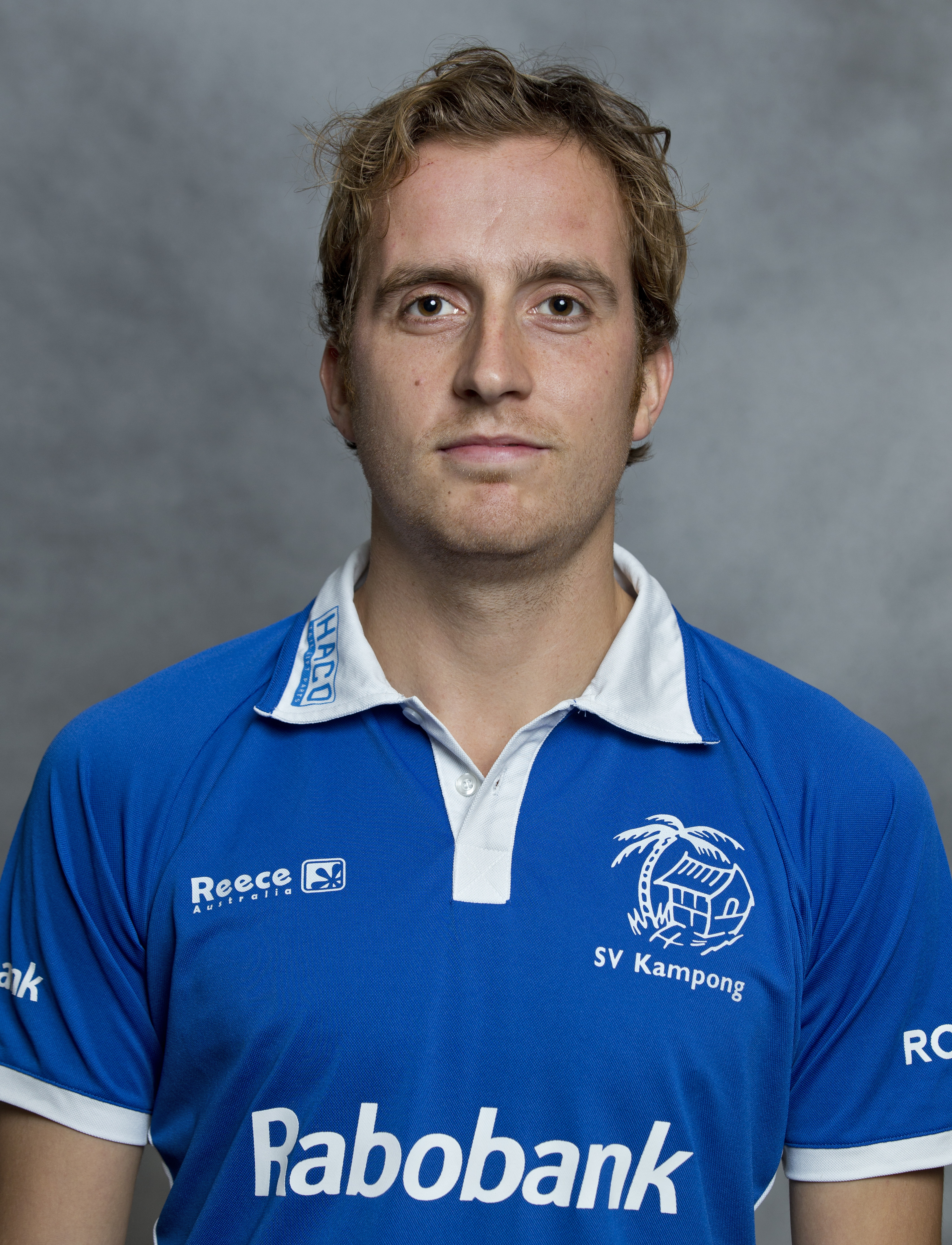 Nederlands hockeyspeler